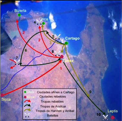 Guerra de los Mercenarios, teatro principal de operaciones